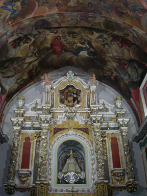 Església de Sant Bernabé Apòstol de Corcolilla (Alpont, els Serrans)